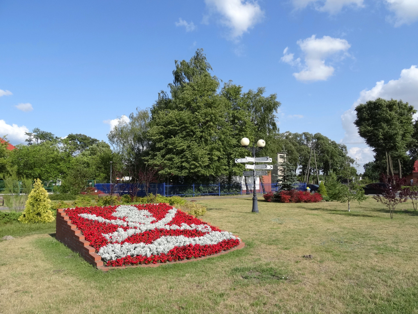 Kwiatowy herb gminy Nowa Wieś Wielka i róża odległości na skwerze w Nowej Wsi Wielkiej